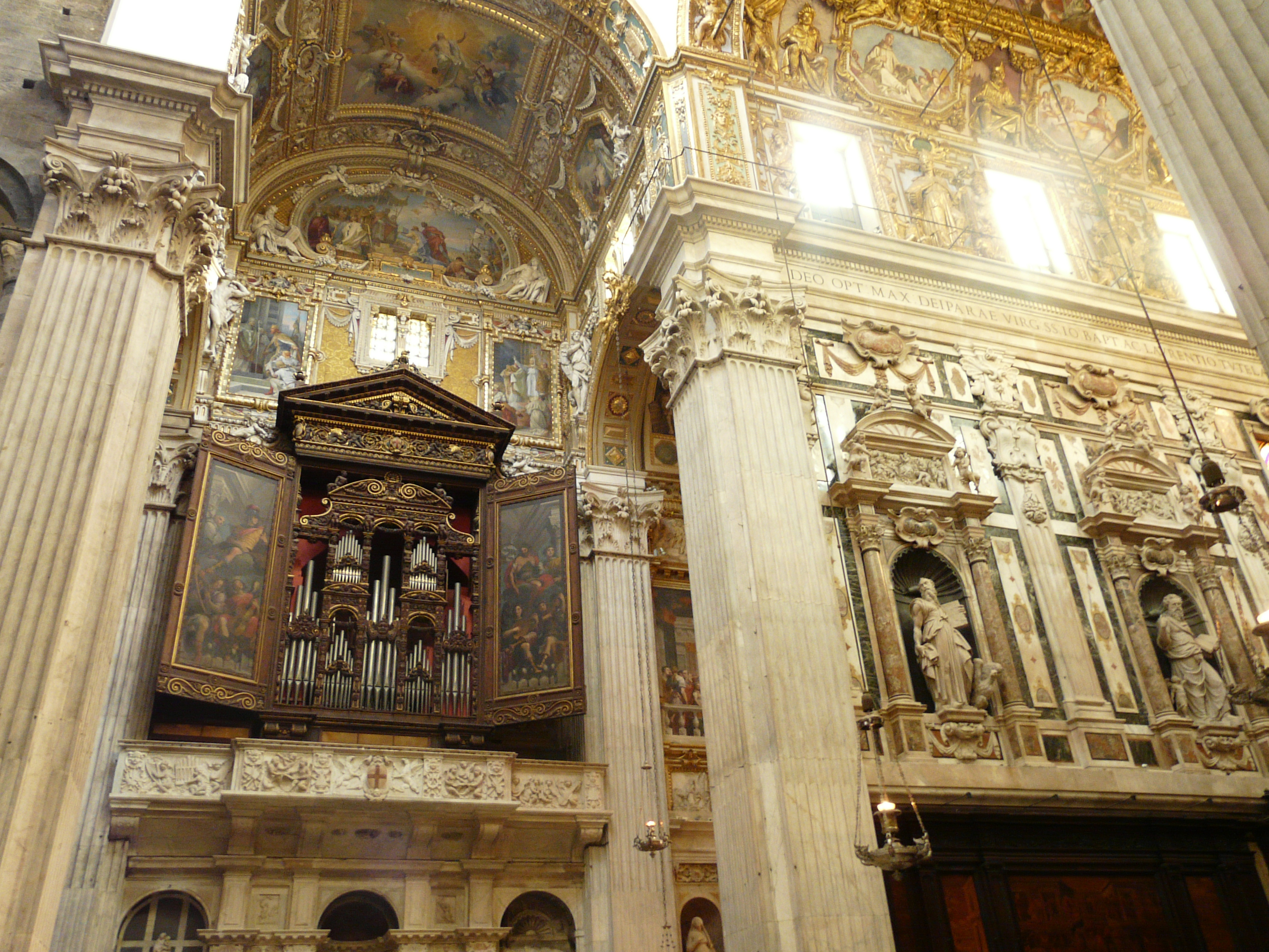 Organo a canne della Cattedrale di San Lorenzo, Genova, Liguria, Italia